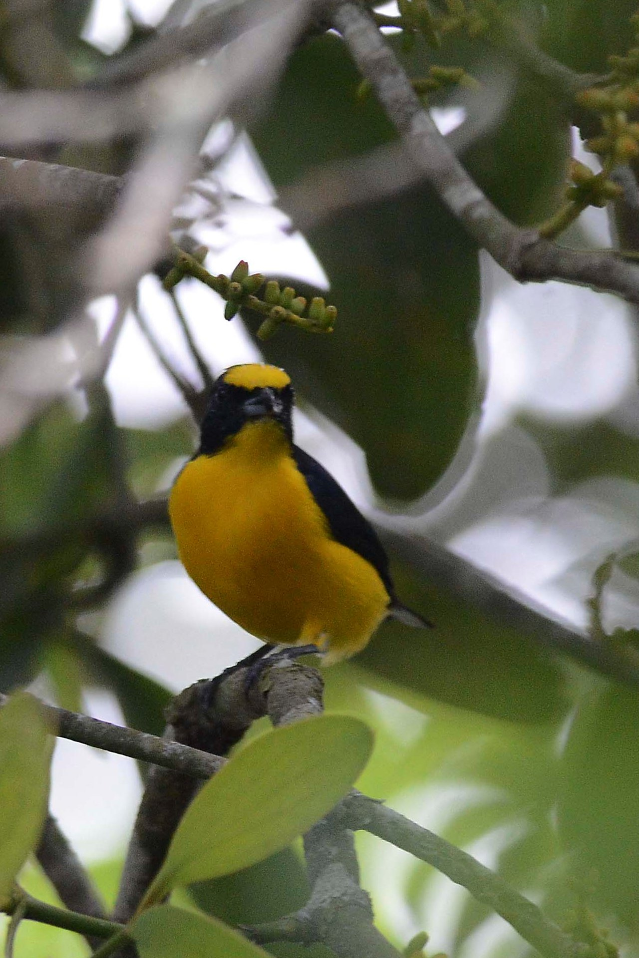 Campeche, México